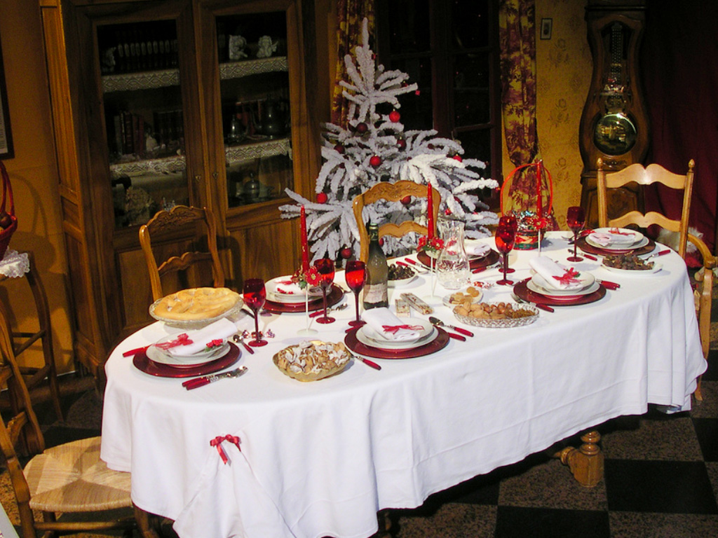 Les treize desserts présentés dans le péristyle de l'Hôtel de ville à Avignon